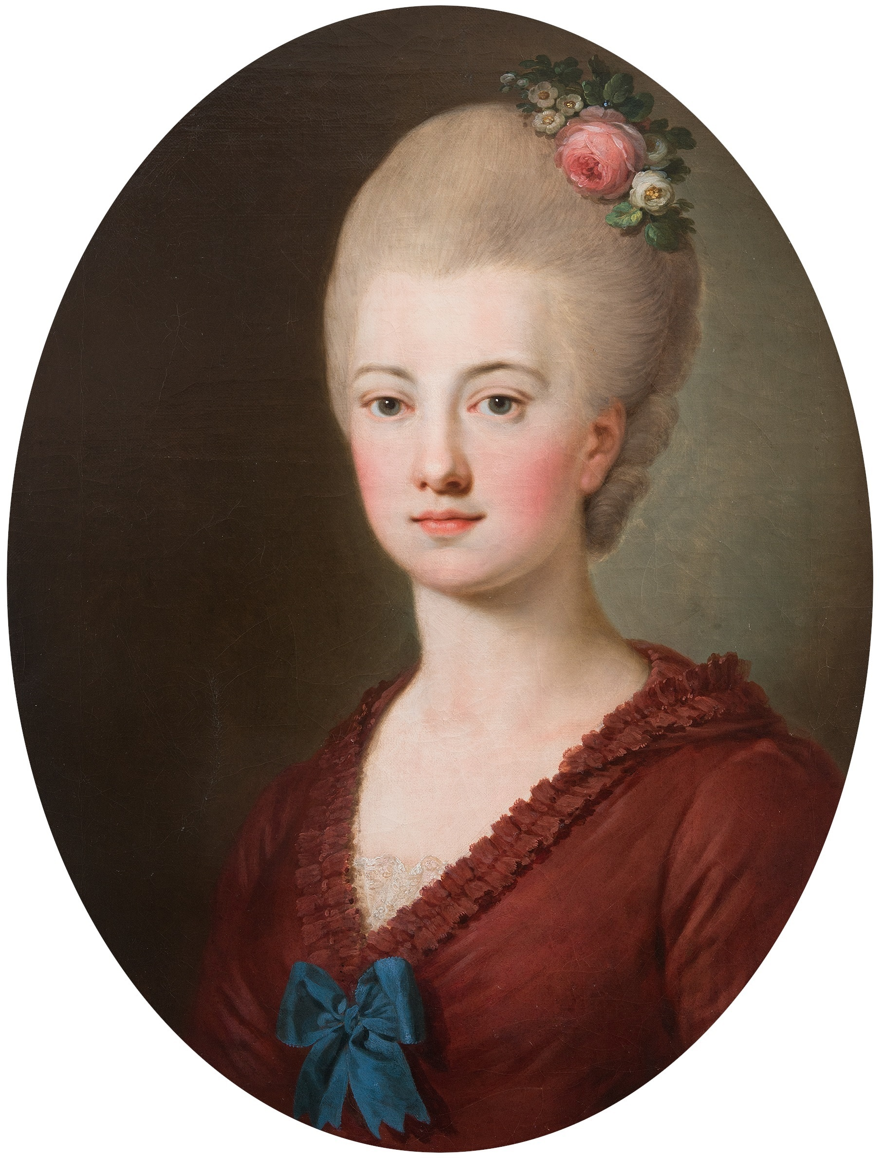 Cecylia z Potockich Sanguszkowa (1747-1772)